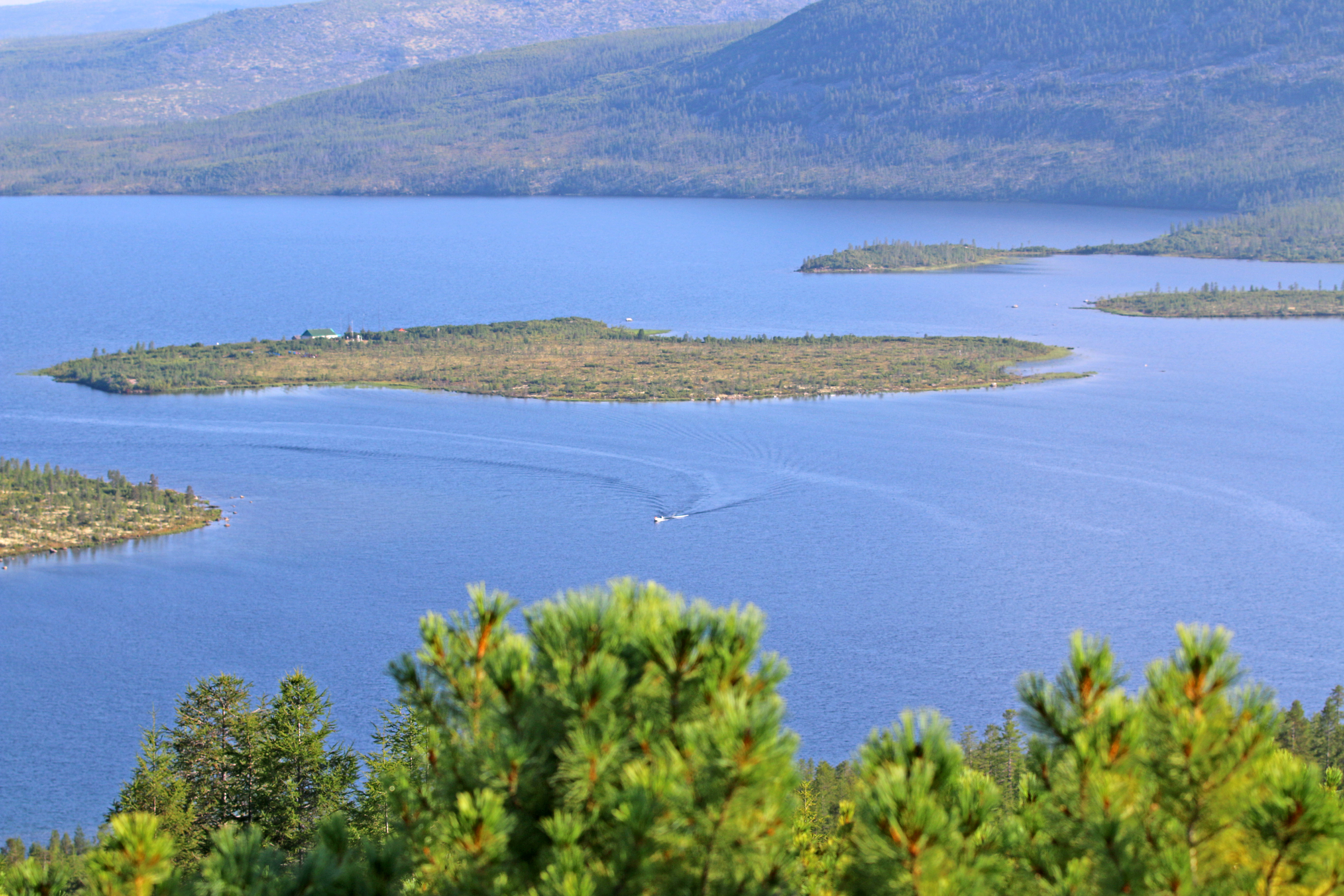 Озеро Джека Лондона: Ягоднинский район, Магаданская область This image is related to the protected area of Russia number 4910060